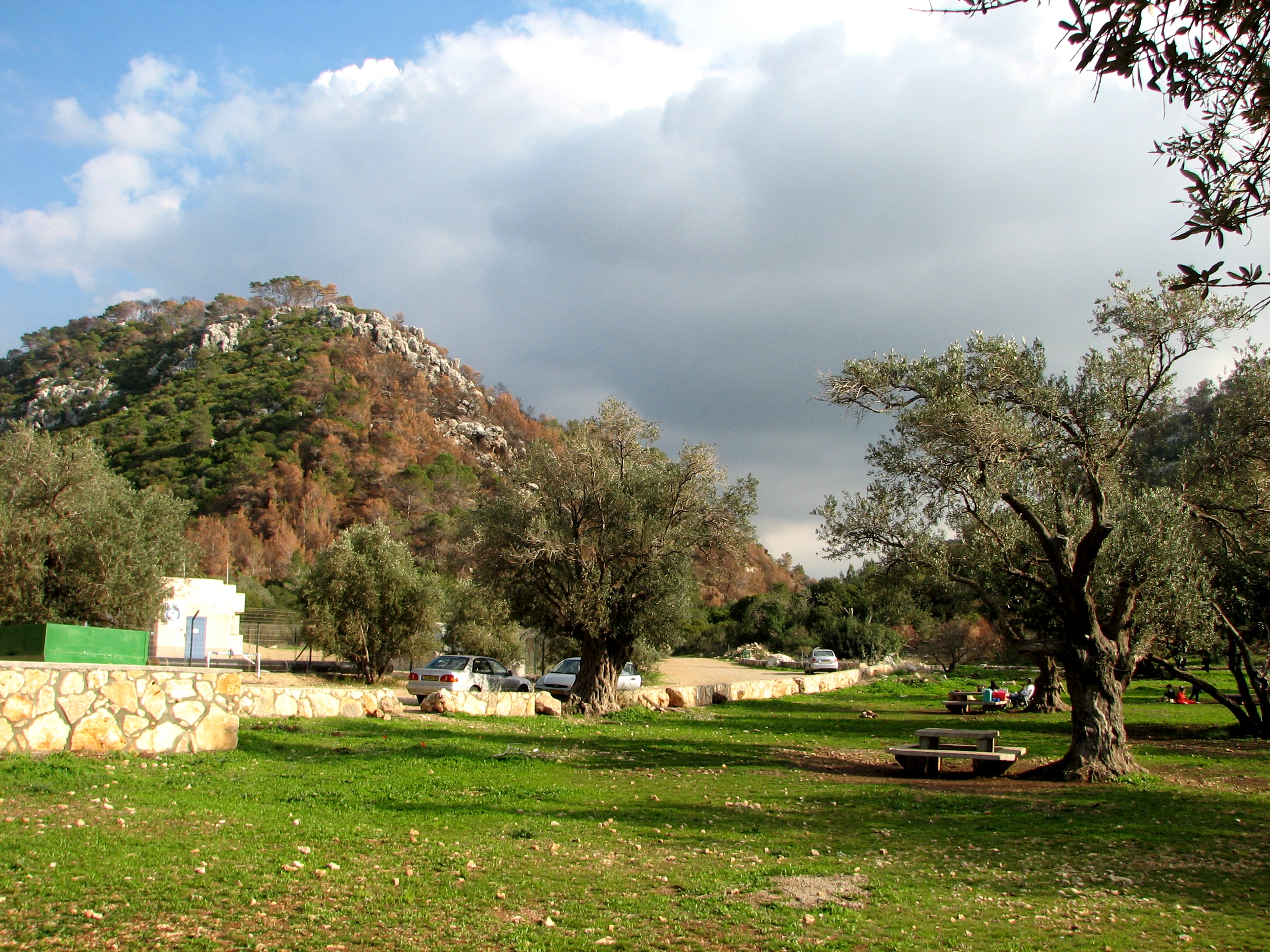 Nahal Bustan on Mount Carmel . נחל בוסתן הוא הוא נחל אכזב בהר הכרמל באזור הכרמל התיכון. תחילתו ממערב לדלית אל כרמל והוא זורם מערבה ונשפך לנחל אורן. בנקודת השפך הנוף הופך רחב ונטועים בו עצי זית